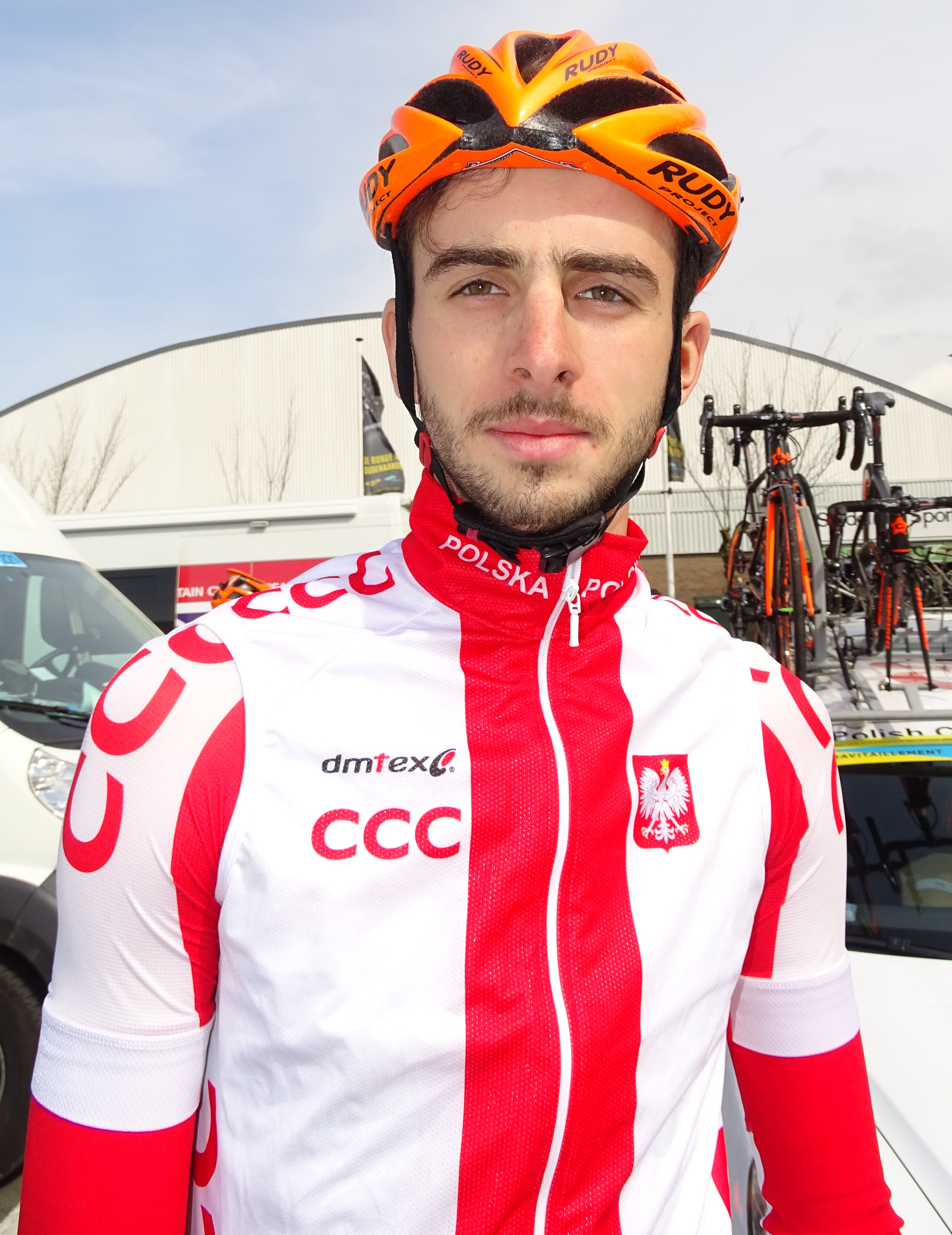 Reportage réalisé le samedi 9 avril à l'occasion du départ et de l'arrivée du Tour des Flandres espoirs 2016 à Audenarde, Belgique.